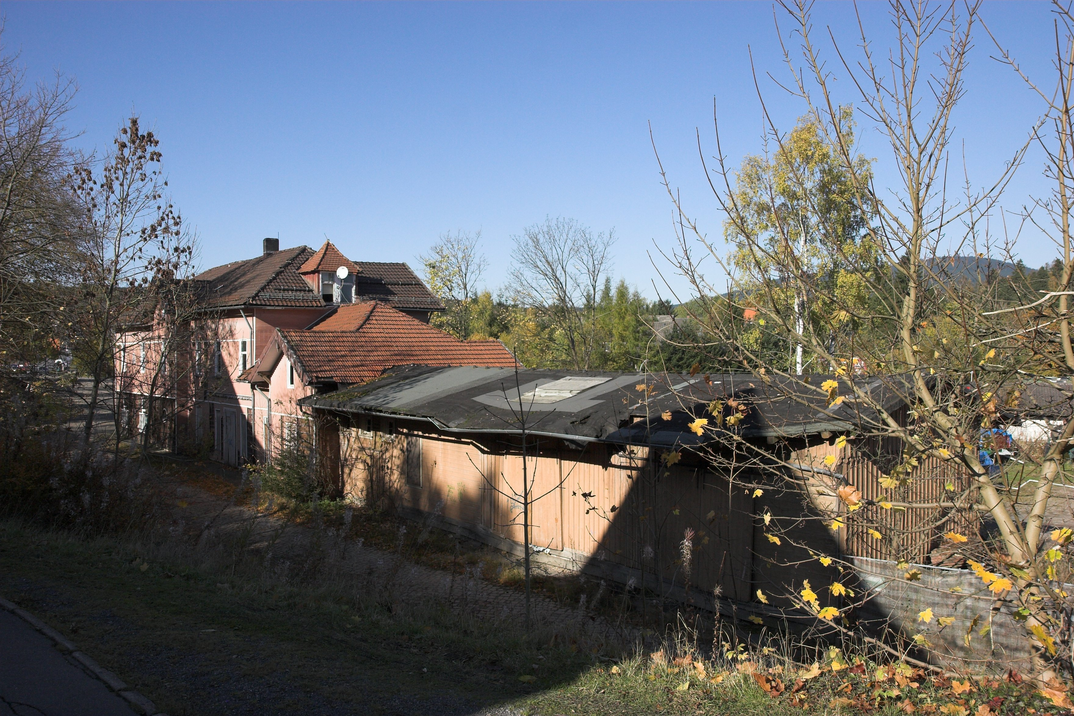 Der 2014 abgerissene Bahnhof der Südharz-Eisenbahn in Braunlage